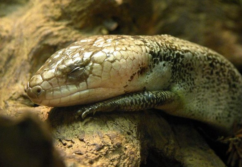 Selbst fotografiert. Aufgenommen mit einer Nikon Coolpix 5700 im Zoo Frankfurt. Fotograf/Quelle: Wilfried Berns / Motiv: Gerrards Blauzunge (Tiliqua gerrardi)